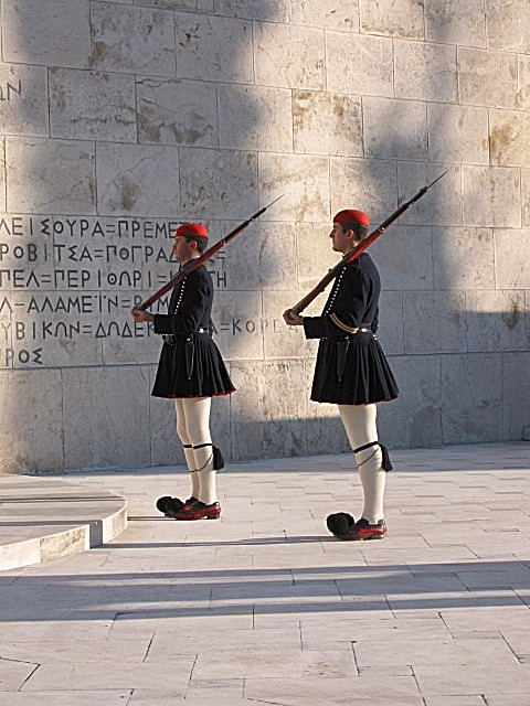 Evzones sur la place Syntagma, Athènes. Photo prise par Harrieta171 le 17/01/04 Bild:Athènes Syntagma.JPG